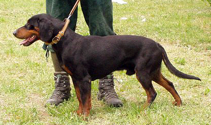 Slovakian Hound/Slovenský kopov